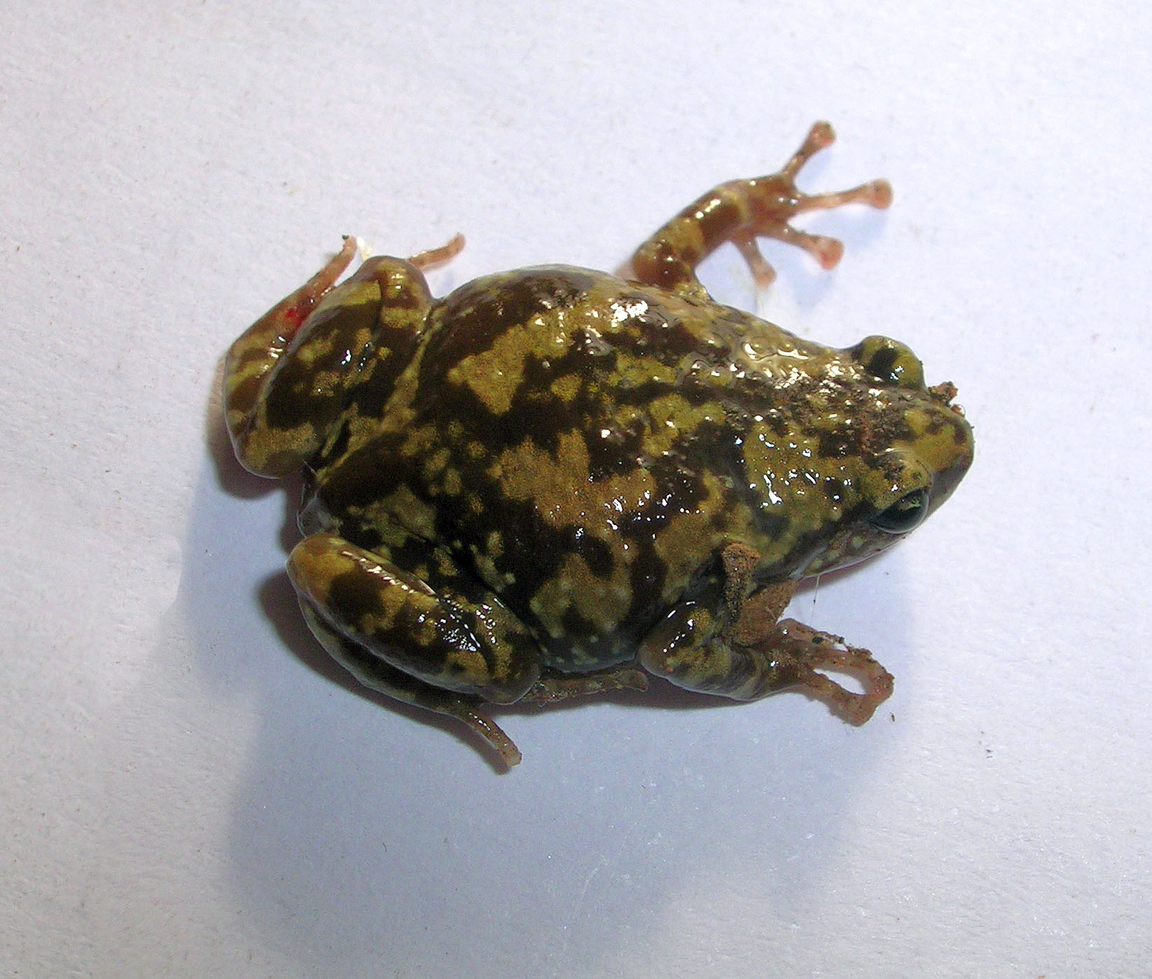 Ramanella variegata from Bangalore, India